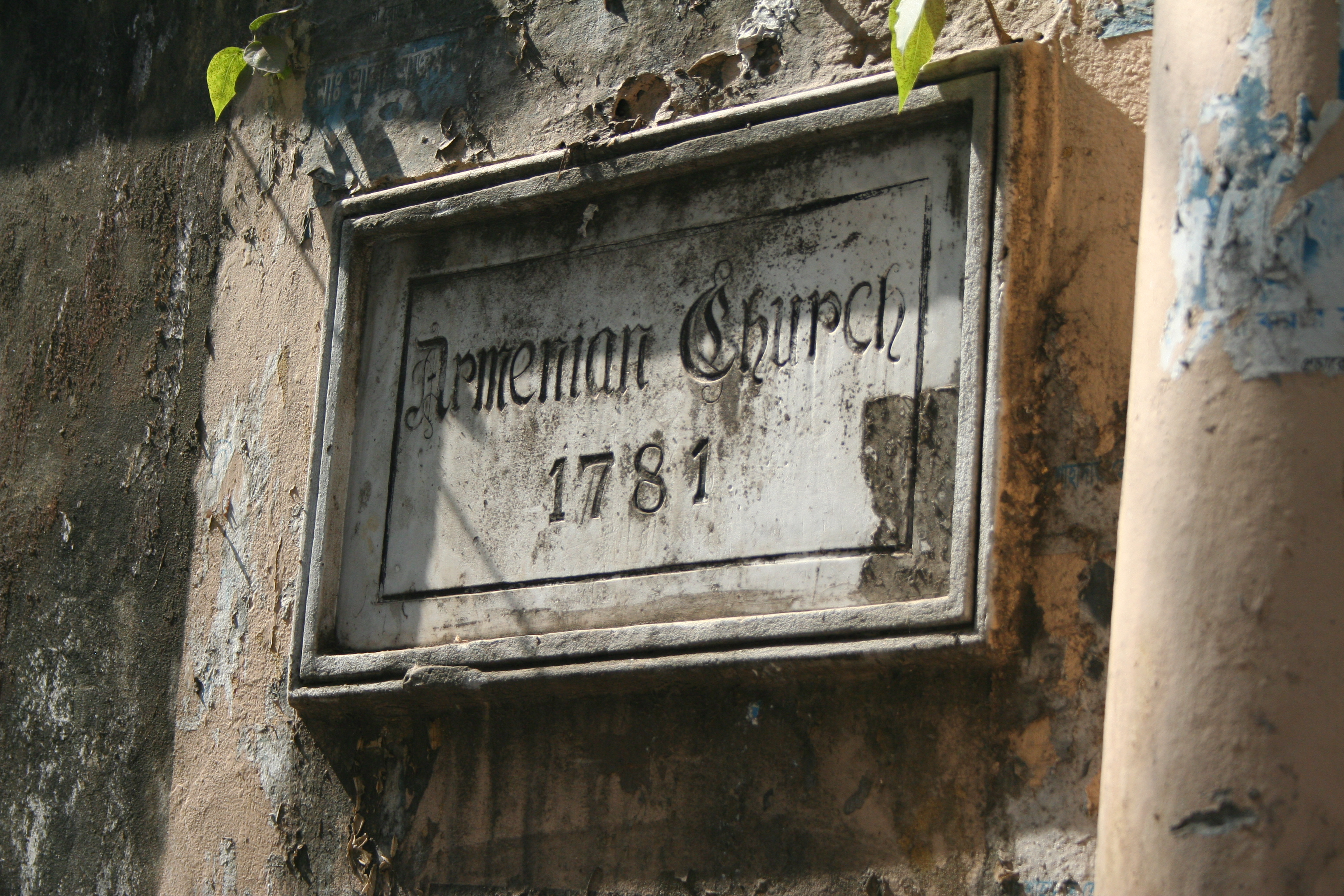 Armenian Church in Dhaka